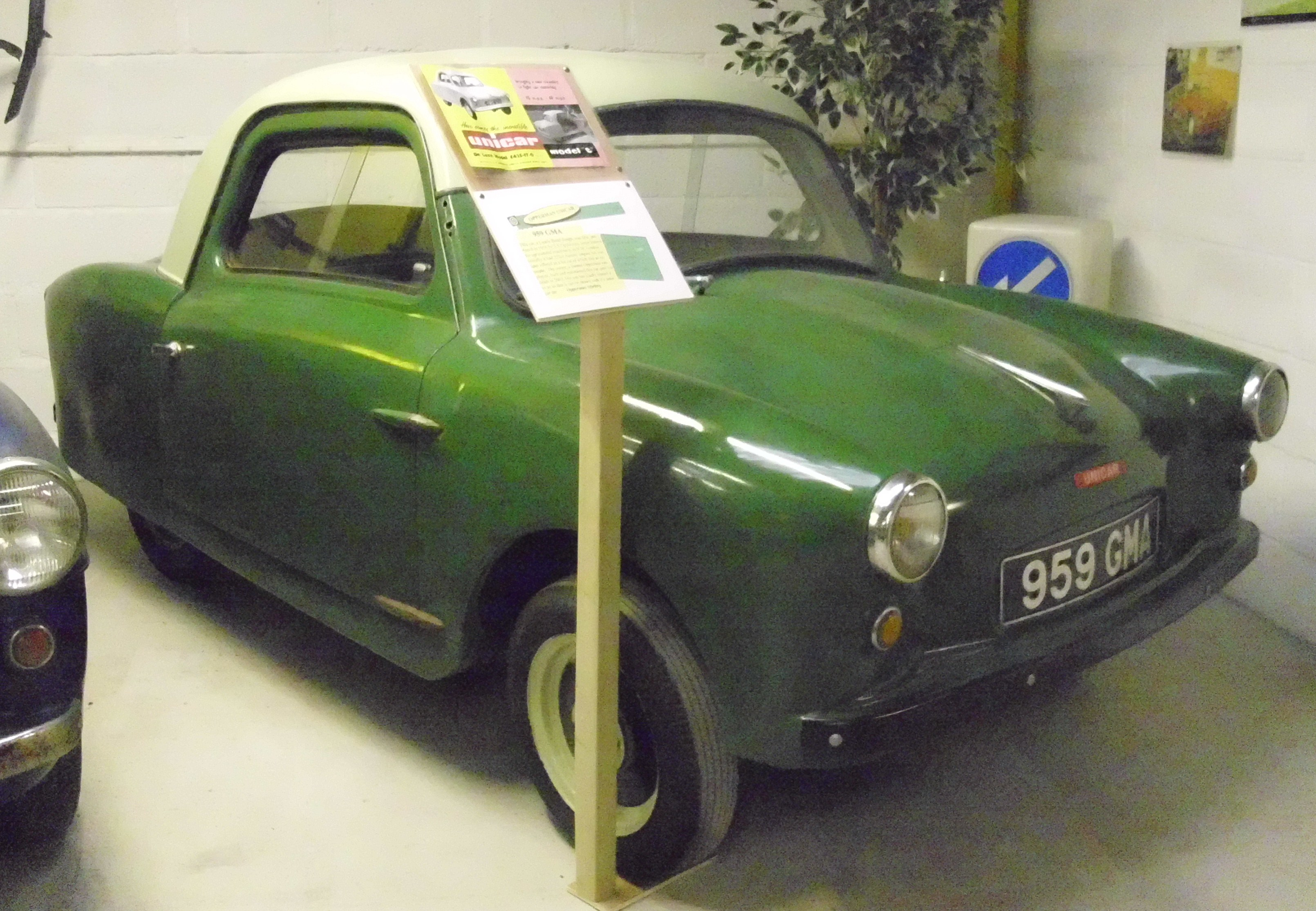 Opperman Unicar 1959